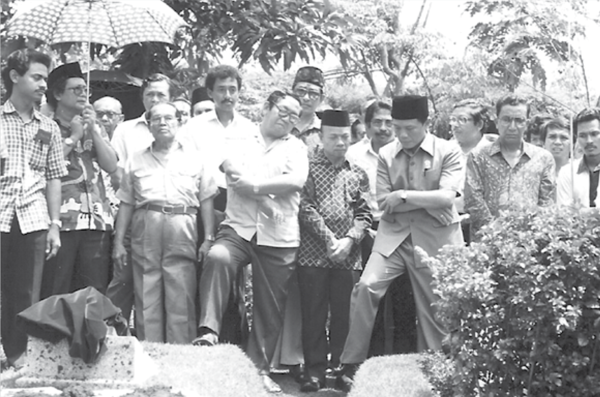 Beberapa tokoh penting hadir saat pemakaman A.R. Baswedan: (Kiri ke kanan) Abdul Gafur (berpayung, Menteri Pemuda dan Olahraga), KH Abdurrahman Wahid alias Gus Dur (Ketua Umum PBNU), H. Harmoko (Menteri Penerangan), Saleh Afif (Menteri Koordinator Bidang Ekonomi dan Keuangan Indonesia).